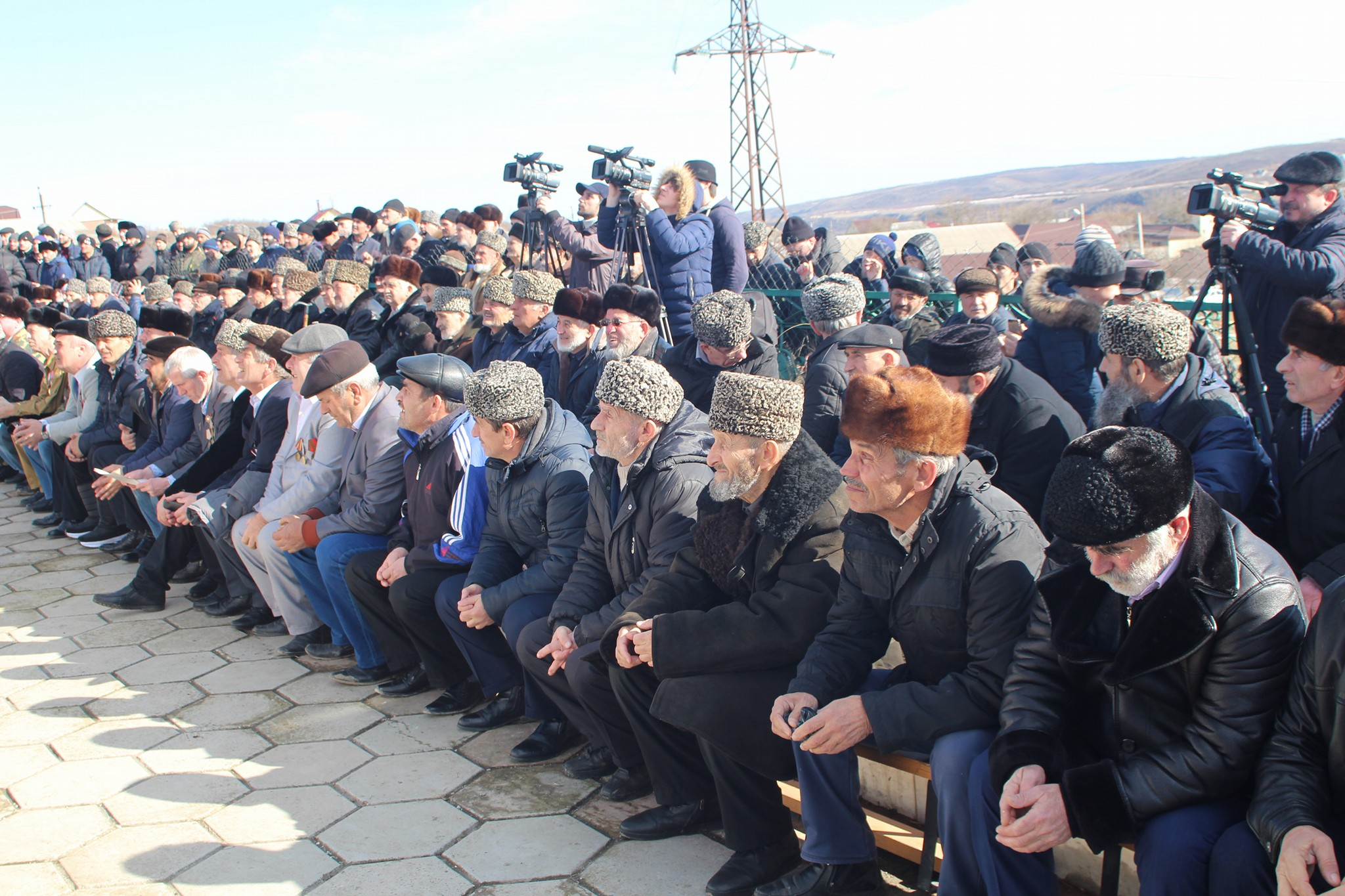 Митинг чеченцев Ауха (23 февраль 2017 год) This file, which was originally posted to was reviewed on 5 March 2017 by the administrator or reviewer INeverCry, who confirmed that it was available there under the stated license on that date.